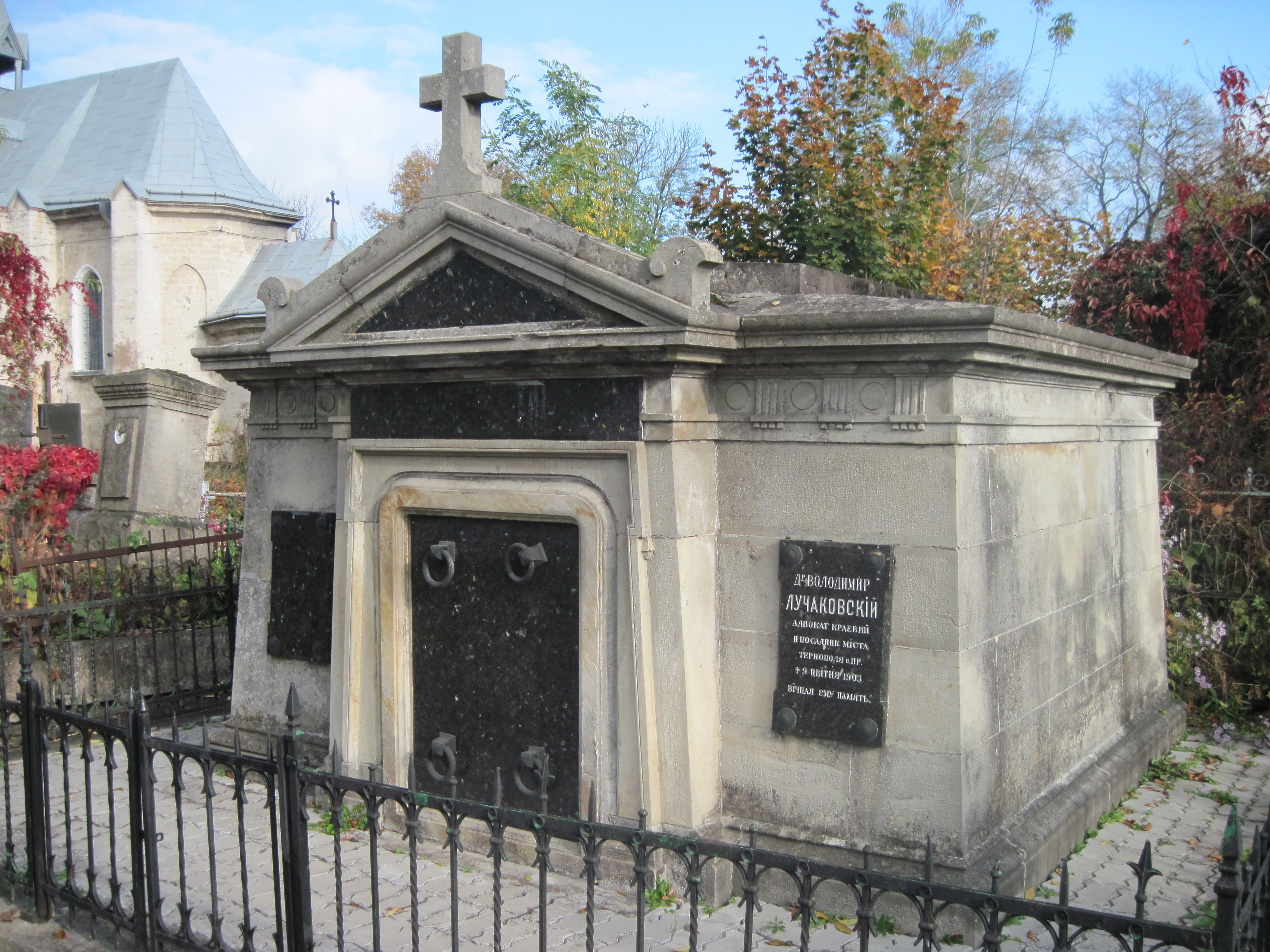 Гробівець, в якому похований український громадський діяч, письменник, перекладач, адвокат і бургомістр (перший українець) у Тернополі д-р Володимир Лучаковський.